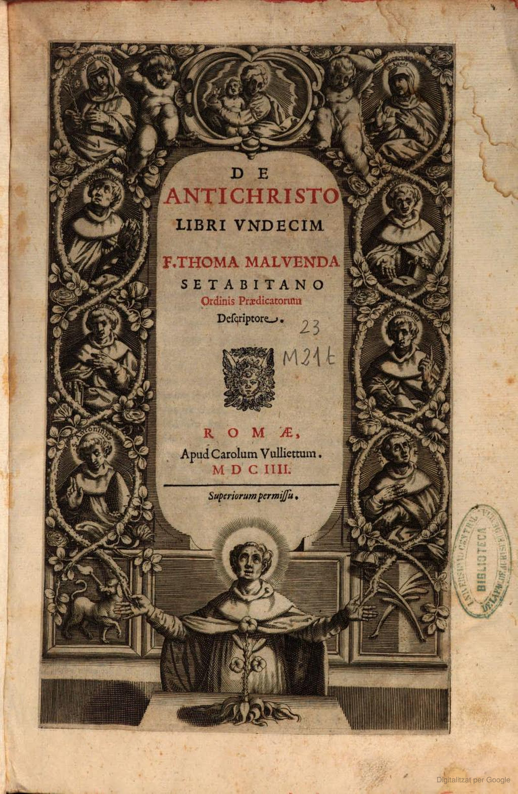 Portada del tractat De Antichristo, de Tomàs Maluenda, publicat a Roma en 1604